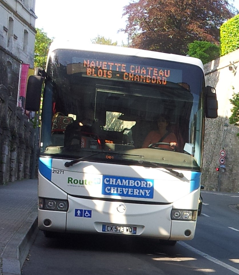 Autocar du réseau Route41 N°21271 avec le panonceau "Châteaux"